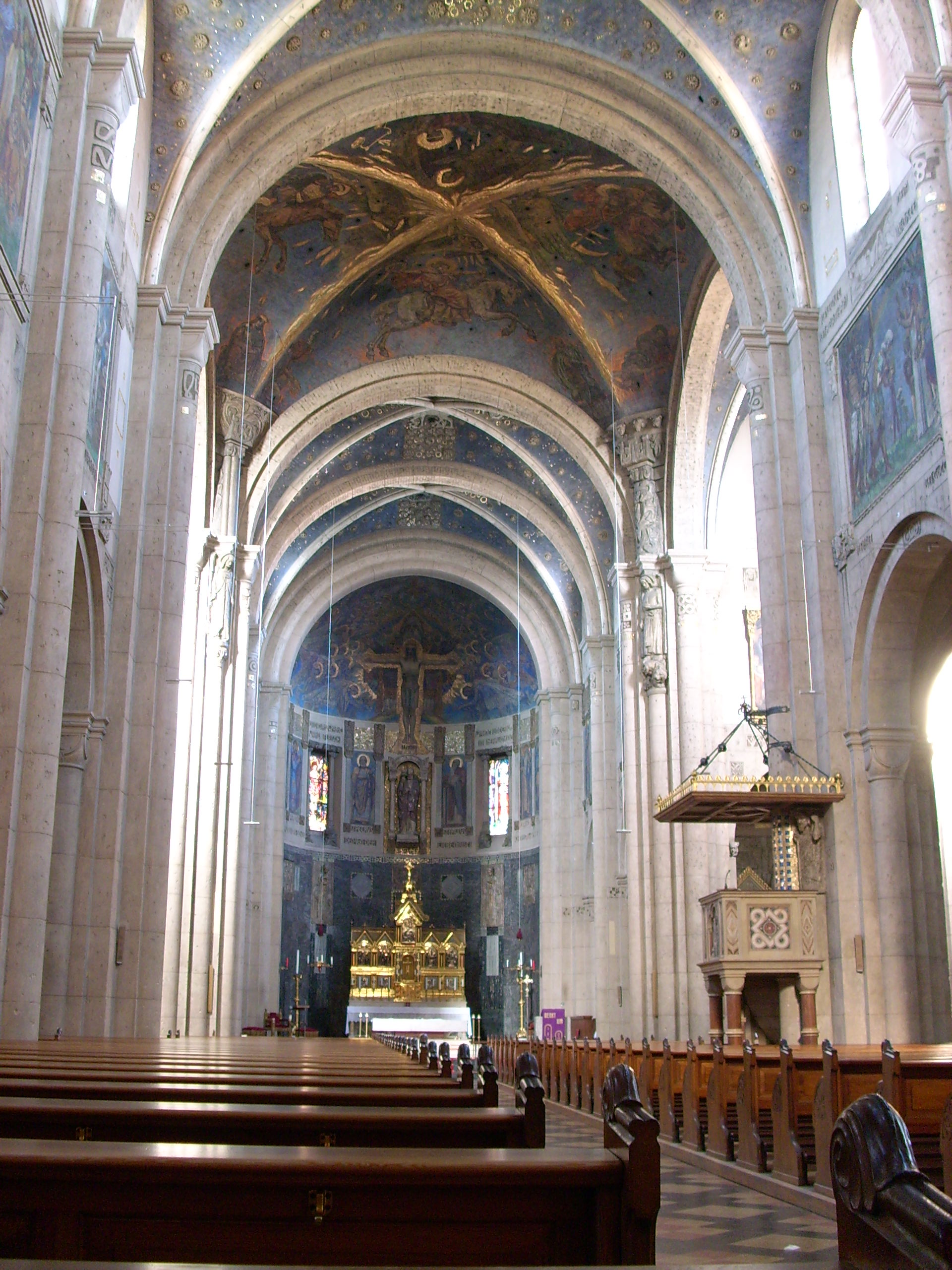 Innenraum von St. Josef, Weiden in der Oberpfalz